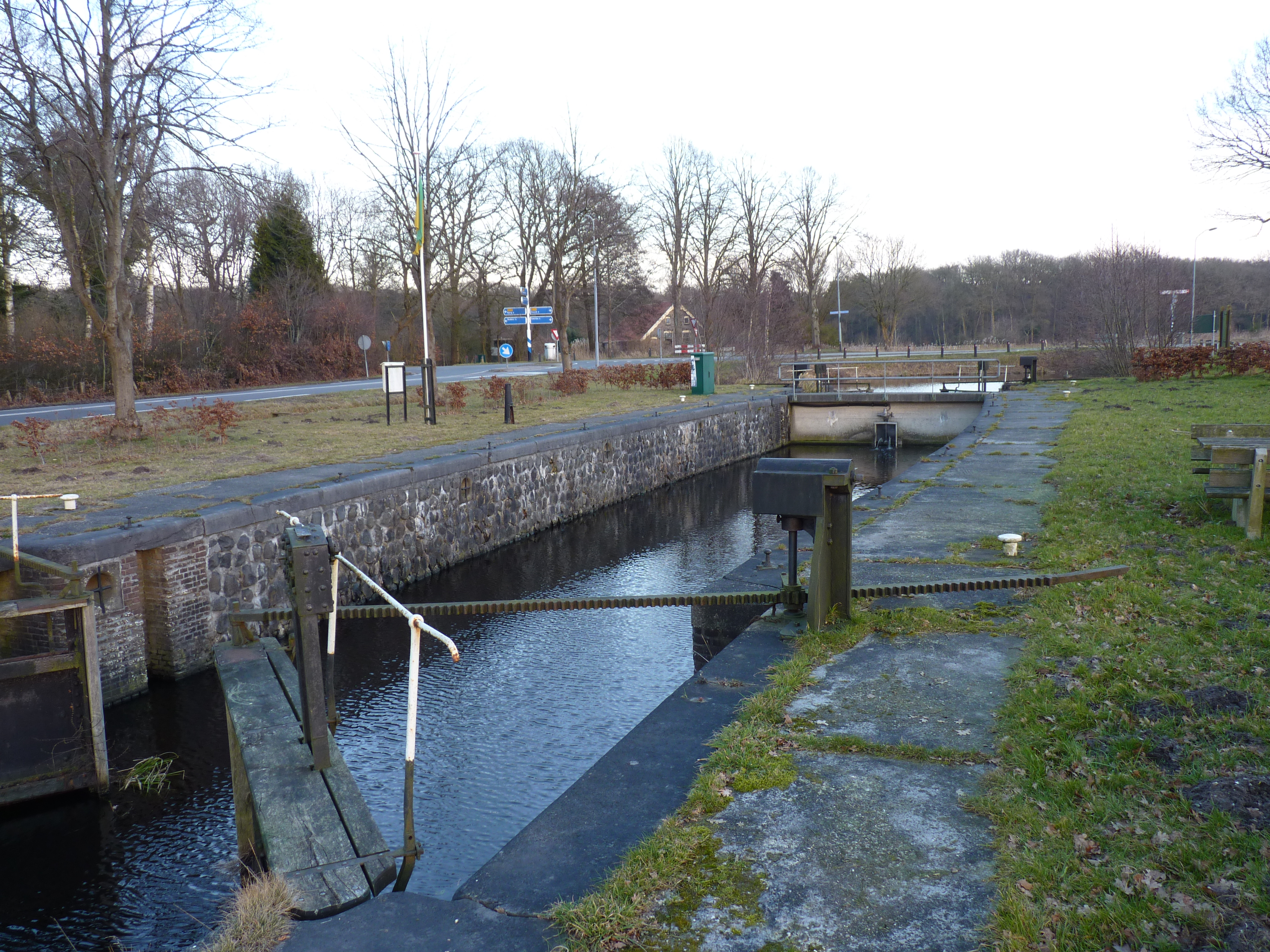 Huis ter Heide Sluis